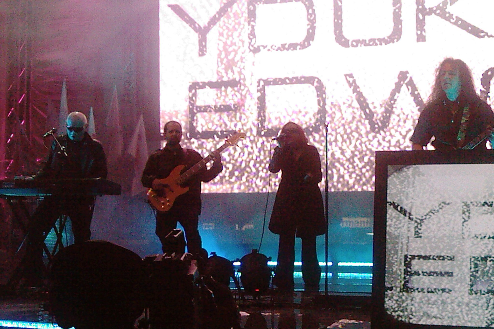 Lombard w Rzeszowie 19-06-2010